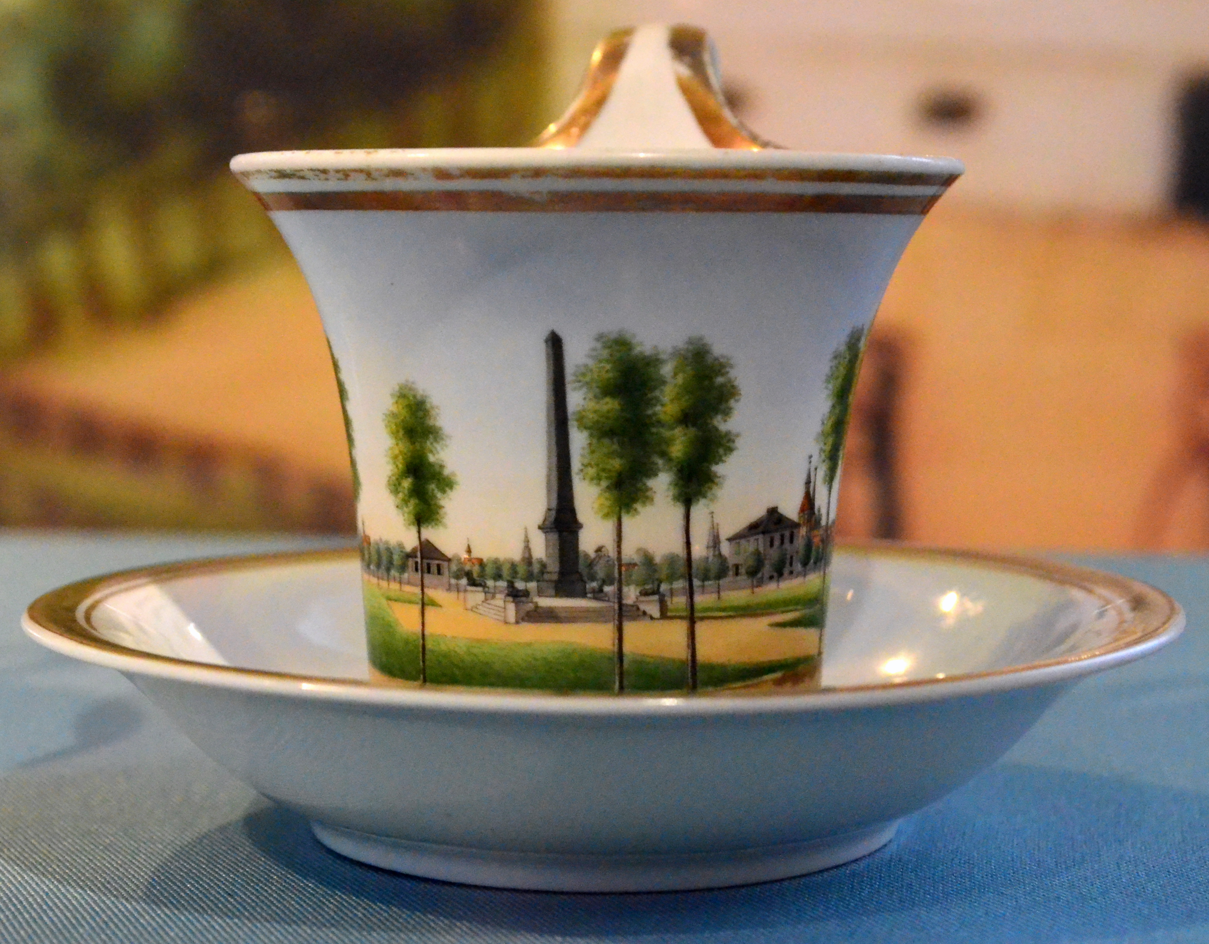 Tasse und Untertasse der Porzellanmanufaktur Fürstenberg von ca. 1830 mit dem Obelisken auf dem Löwenwall in Braunschweig.